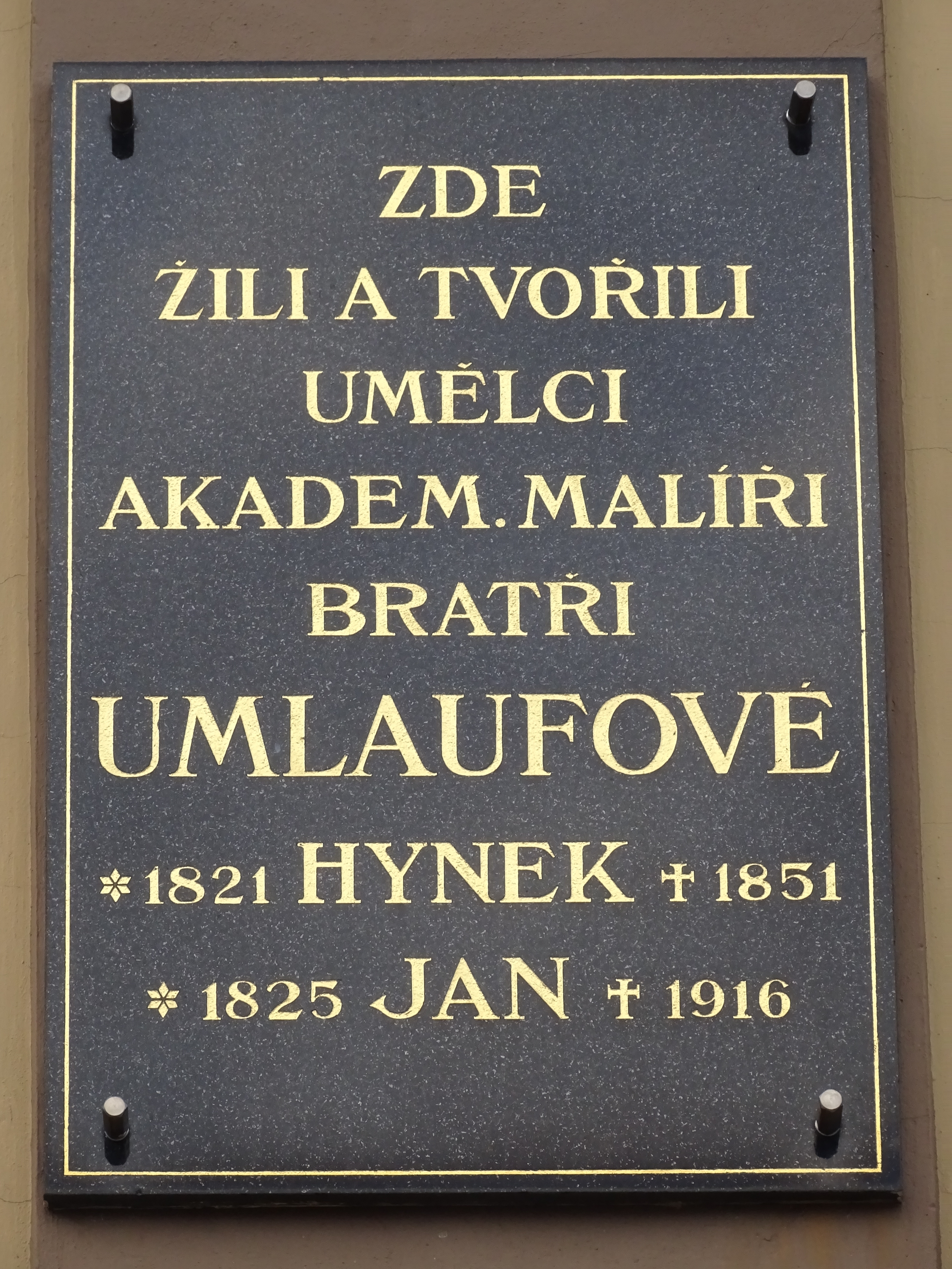 pamětní deska bratrům